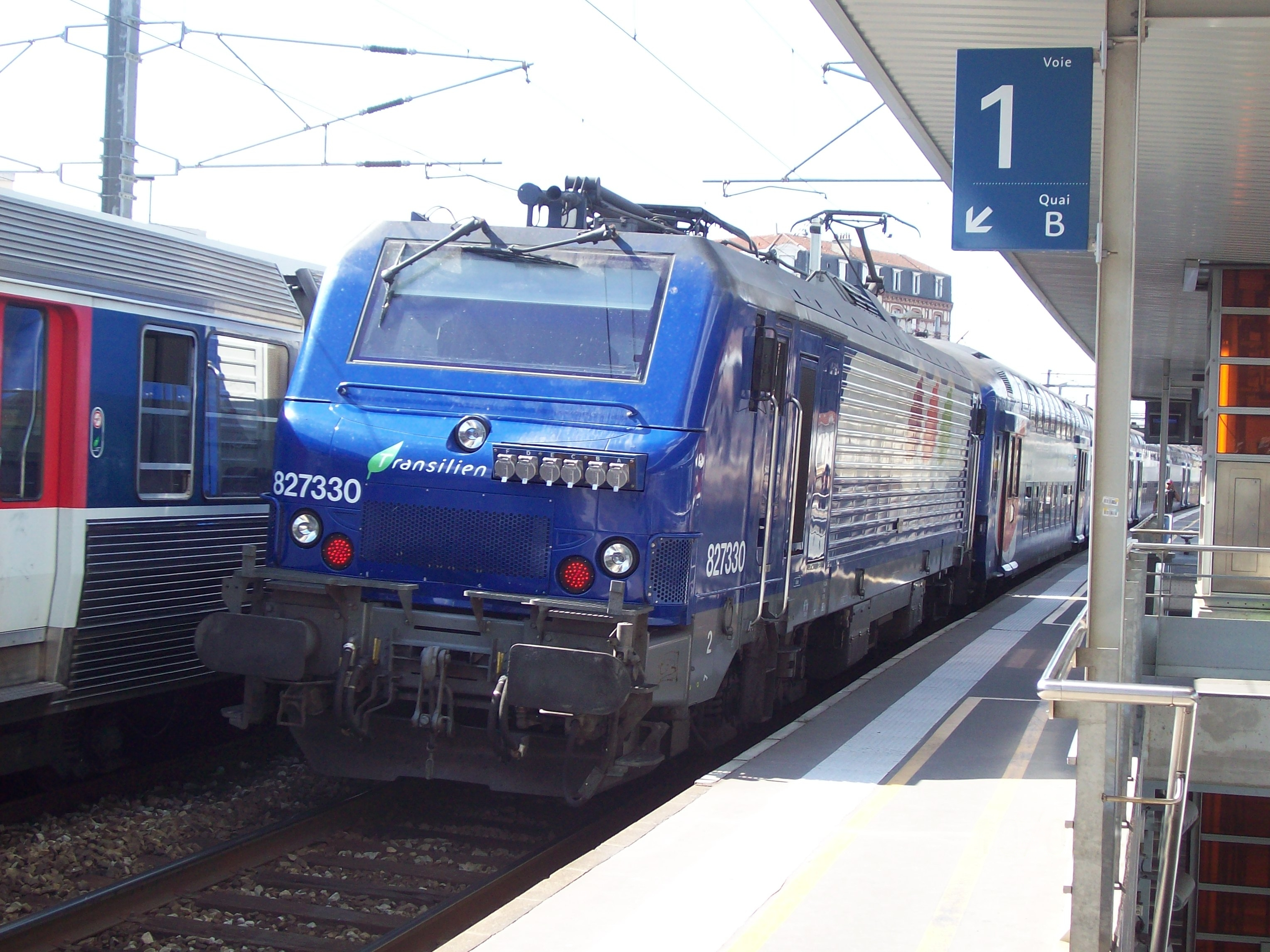 BB 27300 tractée à destination de Mantes, sur la ligne J du Transilien; gare de Houilles-Carrières.